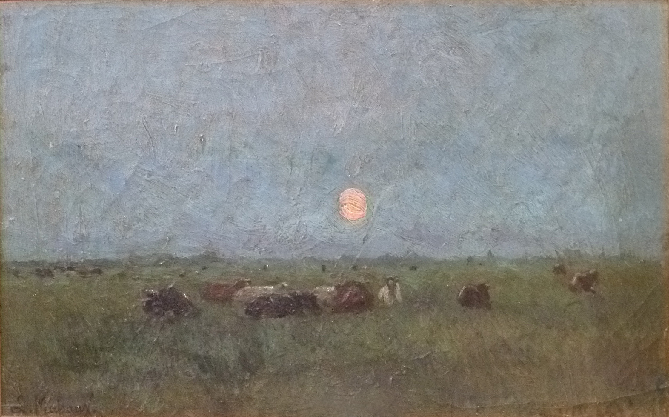 "Landschap met vee", olieverf op doek (30 x 55 cm) door de Belgische kunstschilder Léon Massaux (1845-1926); privébezit